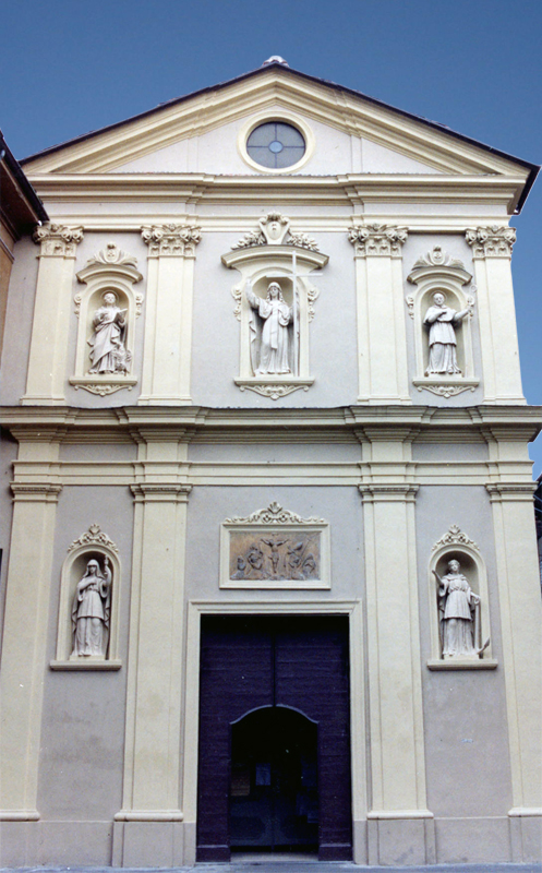 Alessandria, Chiesa di San Giovannino. Nel registro inferiore, al centro, sopra il portone di ingresso alla chiesa, architravato, l’altorilievo tardocinquecentesco del Crocifisso.